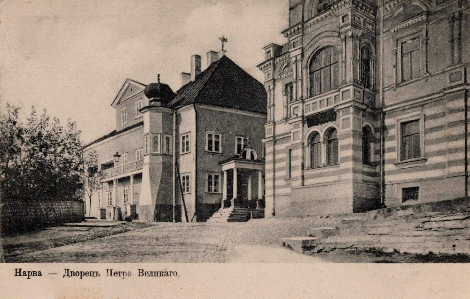 Peeter I maja Narvas